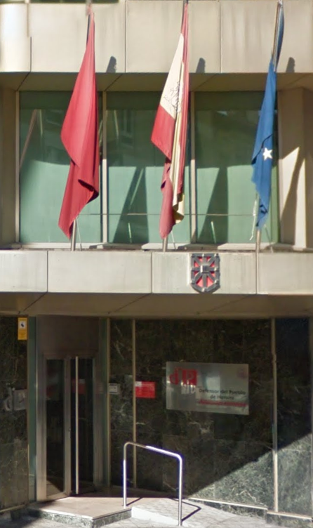 Nafarroako Arartekoa Erakundearen egoitza. Emilio Arrieta, 12, etxabea. 31002 Iruñea